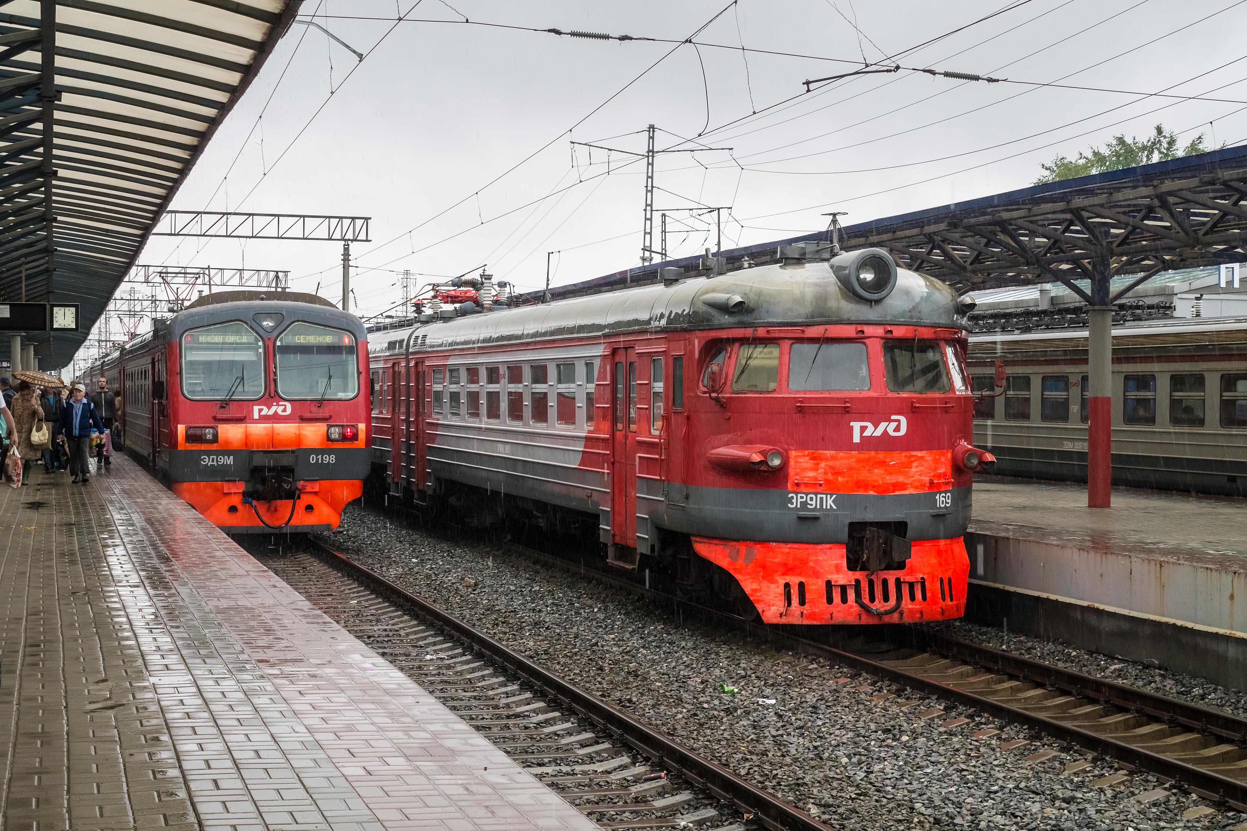 ЭД9М-0198, ЭР9ПК-169, станция Нижний Новгород-Московский см. фото 697116 в альбоме автора